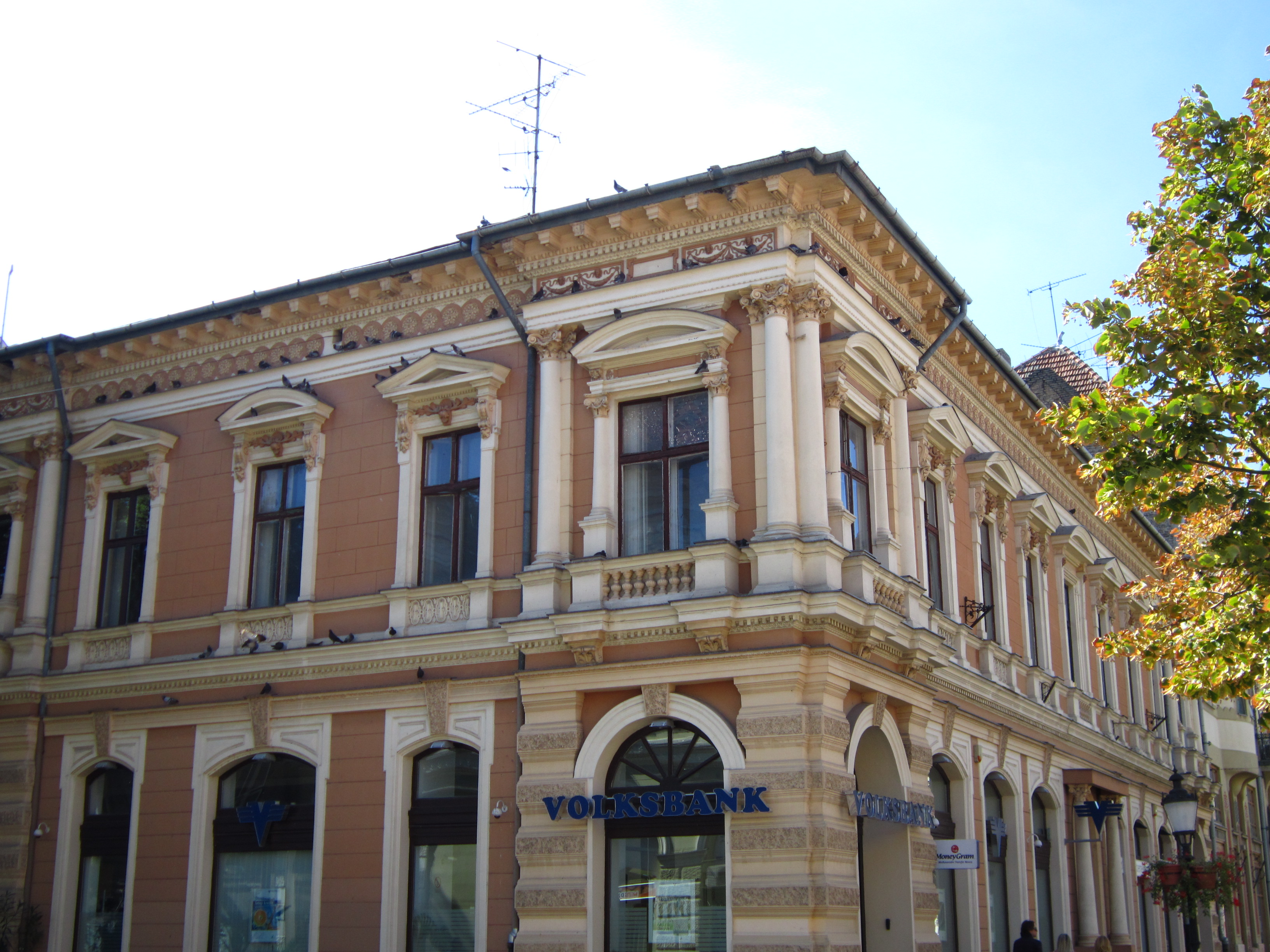 Зграда у Ул. Корзо бр. 6 , Суботица